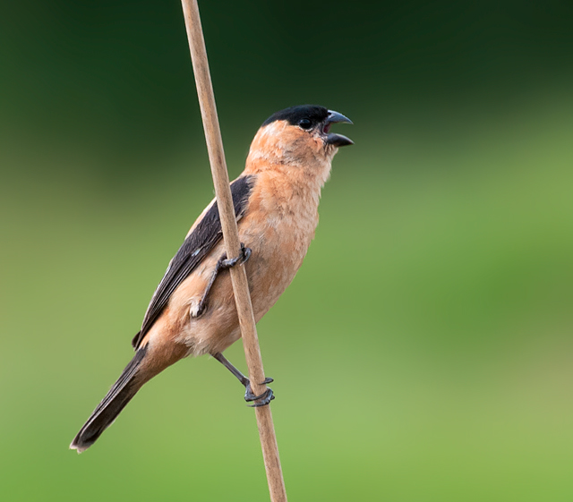 Copper Seedeater